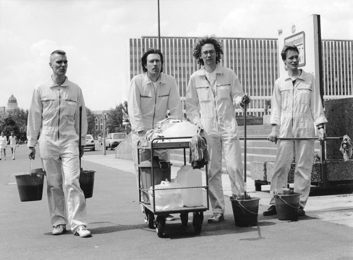 Hans-Peter Klie: DER KONGREß, Aktion Palast der Republik - Außenreinigung, 1992